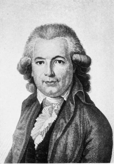 Carl August Böttiger(1760-1835) Schulmann und Alterstumforscher Stich nach dem Gemälde von F. A. Tischbein. Böttinger, zuerst durch sein grosses Wissen nicht nur Goethe und Schiller nützlich, sondern besonders Wieland wertvoll als eigentlicher Herausgeber des "Teutschen Merkur" (seit 1796), machte sich bald mißliebig durch seine üble Betriebsamkeit und Klatschsucht. Nach Böttingers unberechtigter Verfügung über das Manuskript von "Wallensteins Lager" rückte Goethe von ihm ab und brach mit ihm nach Böttigers Kritik der Aufführung von Schlegels "Ion". Böttinger ging 1804 nach Dresden. In Goethes Nachlaß fand sich neben anderen Invektiven eine "K... und B..." überschriebene, die beginnt: "Die gründlichsten Schuften, die Gott erschuf, ..." Mit K. ist August Friedrich Ferdinand von Kotzebue (1761-1819) gemeint.